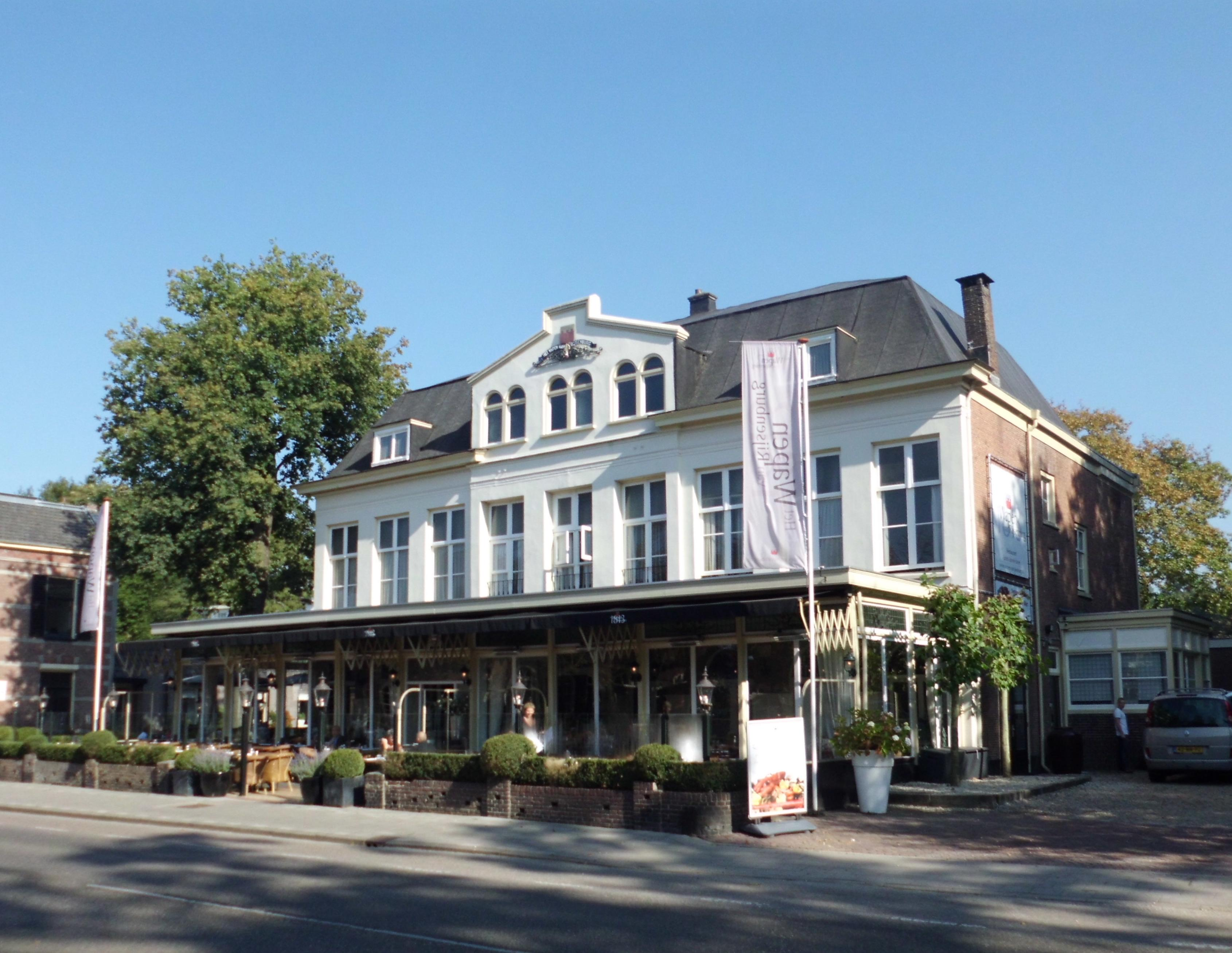 Hotel Wapen van Rijsenburg, Driebergen-Rijsenburg